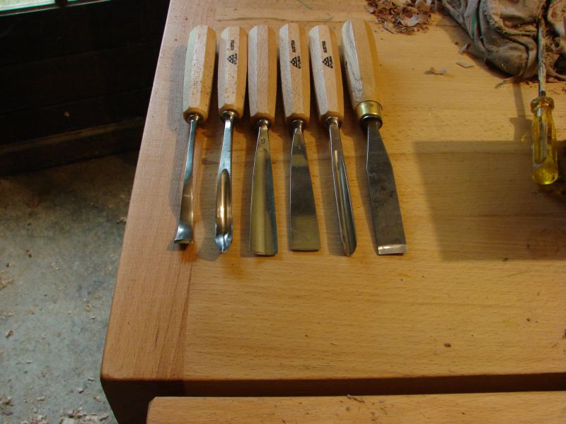 Outils de sculpture. De gauche à droite : Gouge contre coudée - Gouge cuillère - Gouge standard - Gouge méplate - Gouge à bretter - Fermoir. Photo Yann Vanden Berghe